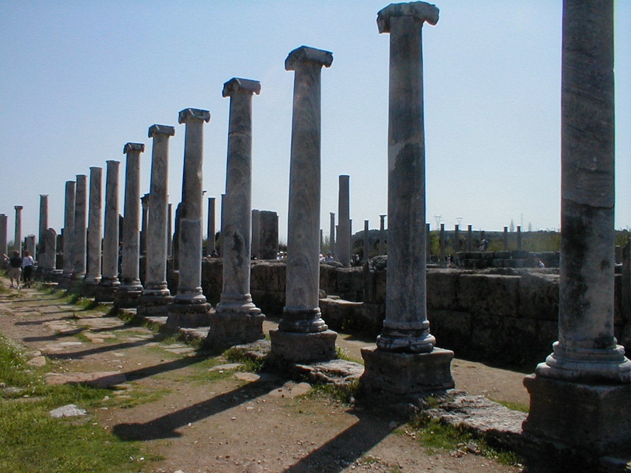 Perge (Perga), Turkey